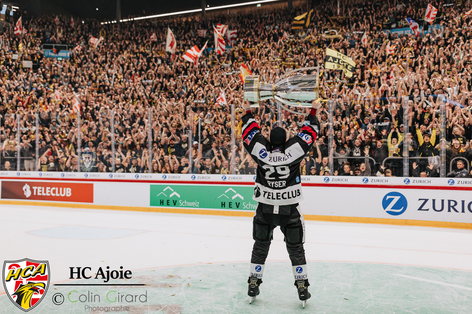 HC Ajoie, Hockey sur Glace, victoire en coupe de Suisse